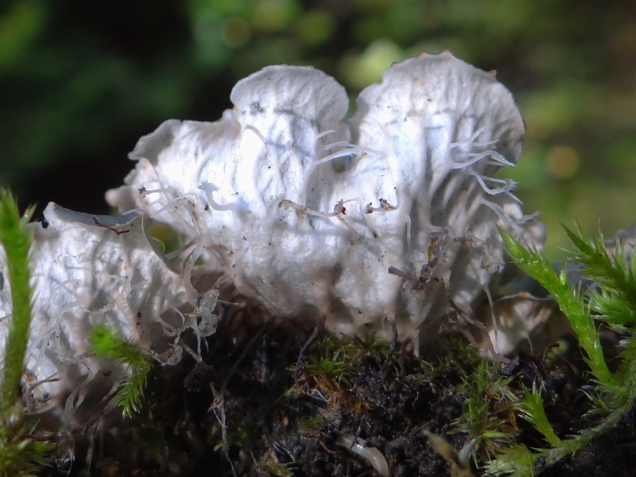 Peltigera praetextata (location: Poland, Pieniny, podnóża Trzech Koron w Sromowcach Niżnych